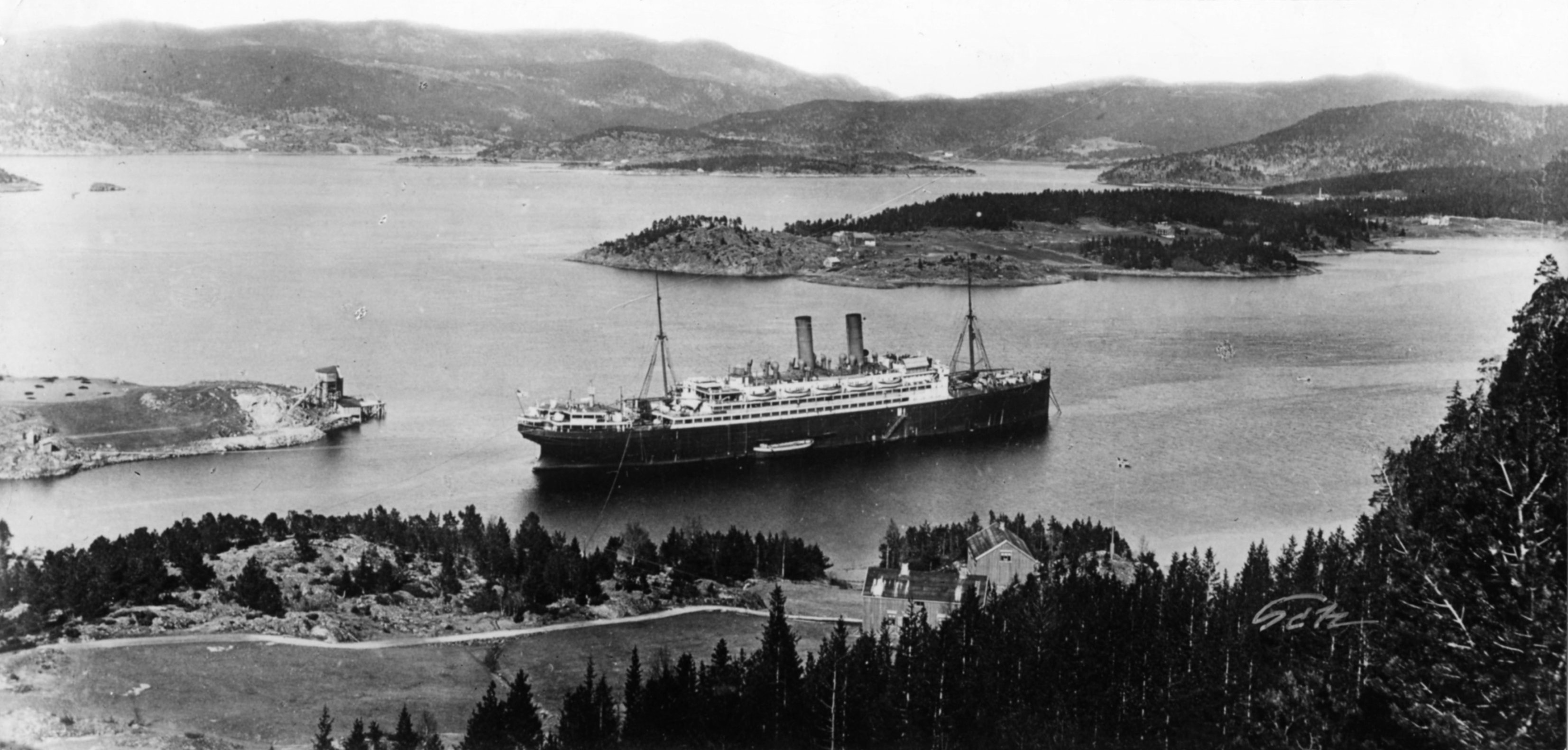 Format: Fotopositiv Dato / Date: 1914 - 1919 Fotograf / Photographer: Schrøder Sted / Place: Lofjorden, Åsen Wikipedia: Hjelpekrysseren Berlin Eier / Owner Institution: Trondheim byarkiv, The Municipal Archives of Trondheim Arkivreferanse / Archive reference: Tor.H42.B48.F3426 Merknad: "Berlin" ble bygget i Bremen i 1909 som passasjerskip, men ble ved utbruddet av første verdenskrig beslaglagt av den tyske keiserlige marine og brukt til minelegging i engelske farvann. På grunn av drivstoffmangel måtte skipet søke nødhavn i Trondheim 17 november 1914. Skipet ble internert og satt under bevoktning i Hommelvik, senere lå skipet i Lofjorden ved Levanger. Flere av mannskapet klarte å rømme og det ble også bedrevet spionasje fra skipet som kommuniserte via trådløse radiosendinger til Tyskland. Skipet skapte med andre ord store krigsrelaterte skandaler i det nøytrale Norge - blant annet skapte det stor oppstand at krysseren i det hele tatt kunne komme seg ubemerket forbi Agdenes og inn i Trondheimsfjorden. Etter 1 verdenskrig ble skipet i 1919 overtatt av engelskmennene og gikk siden under navnet "SS Arabic" inntil opphogging 1931.